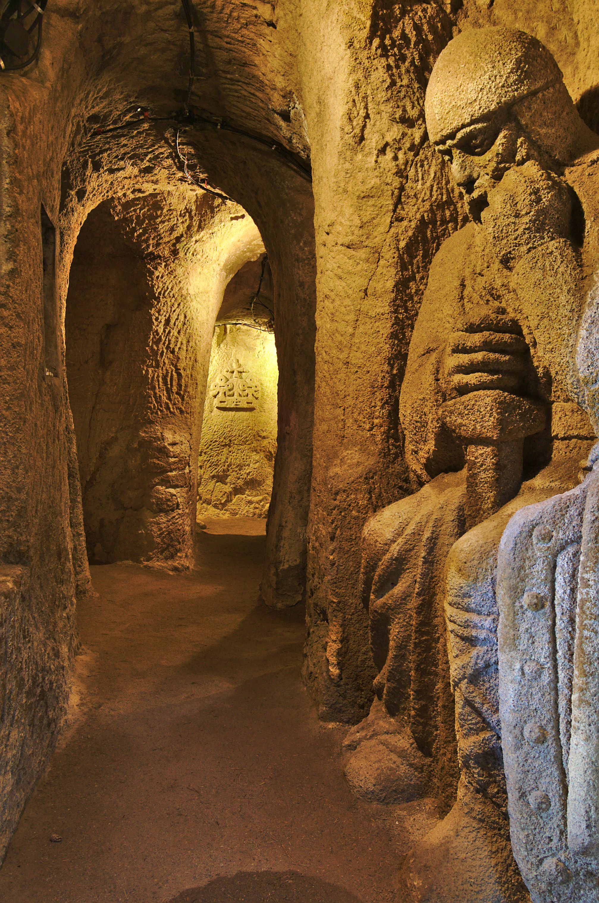 Jeskyně Blanických rytířů, Kunštát, okres Blansko